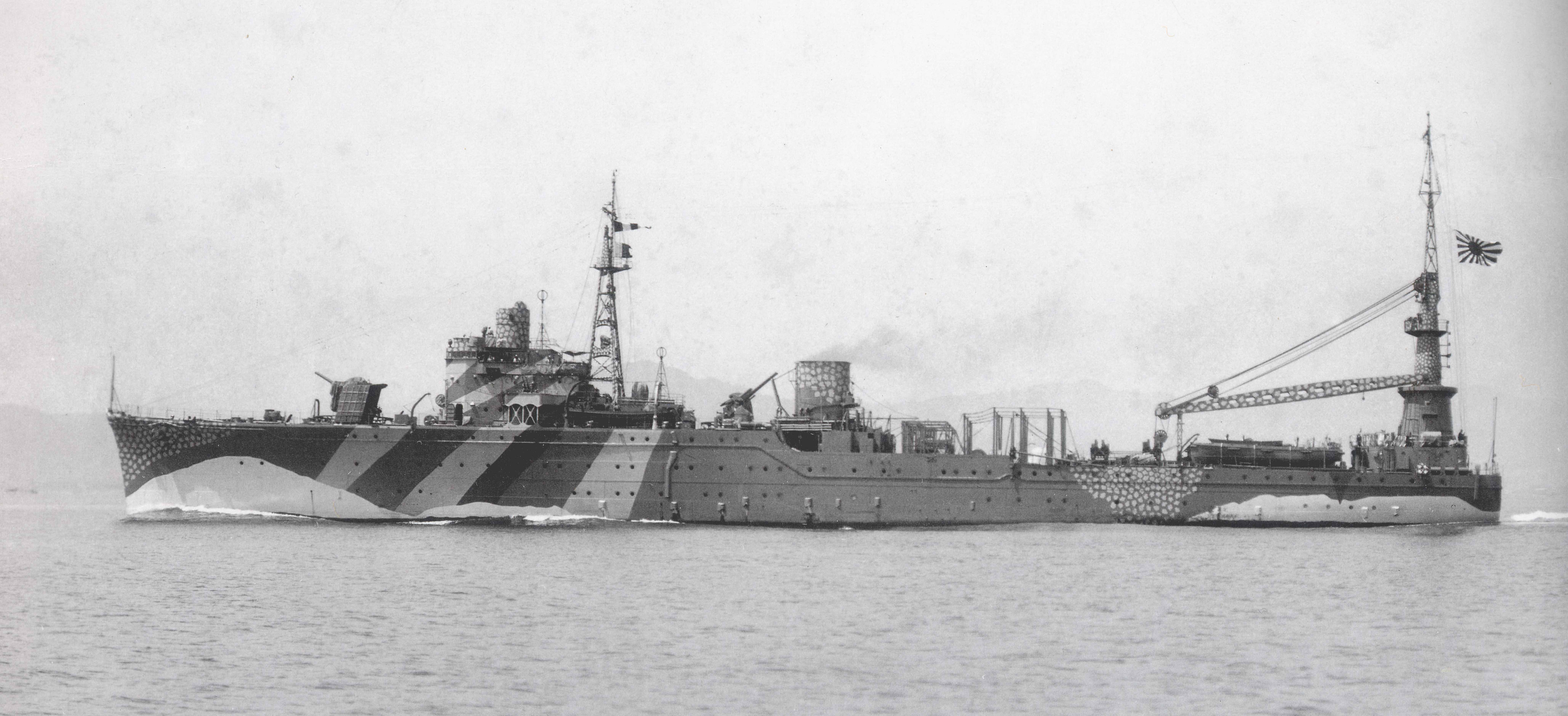 日本海軍水上機母艦「秋津洲」淡路島沖付近にて公試中の写真。